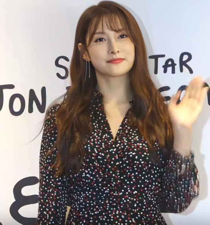 13일 오후 서울시 강남구 역삼동 르 메르디앙 서울에서 열린 ‘Fun Factory : 슈퍼스타 존버거맨 전' 개막식 행사가 열려 화가 존버거 맨과 가수 박규리, 이혜영과 딸, 이사강, 아웃사이더, 키즈 모델 박한음-이재은이 참석해 포토타임을 갖고 있다.